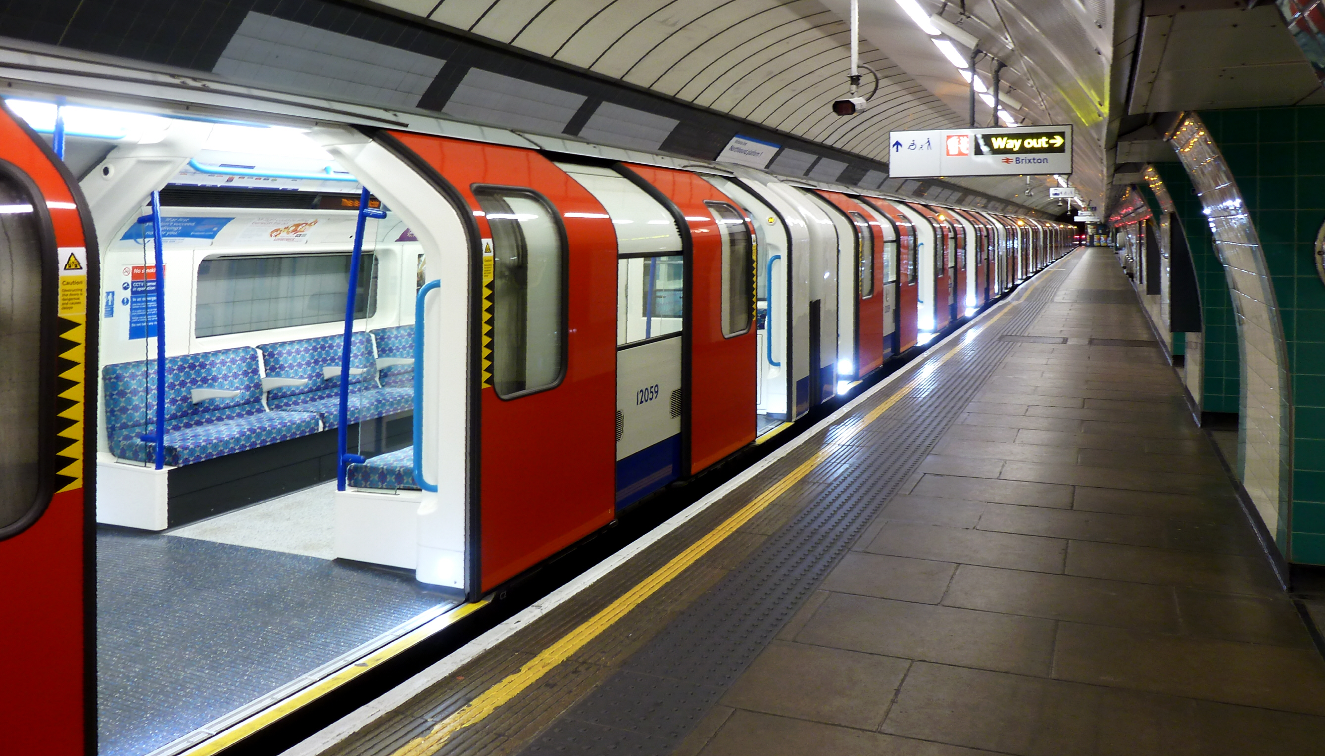 Brixton Tube Station ist der südliche Endpunkt der Victoria Line in London Borough of Lambeth. Diese Station hat ein jährliches Passagieraufkommen von etwa 21 Millionen Fahrgästen.